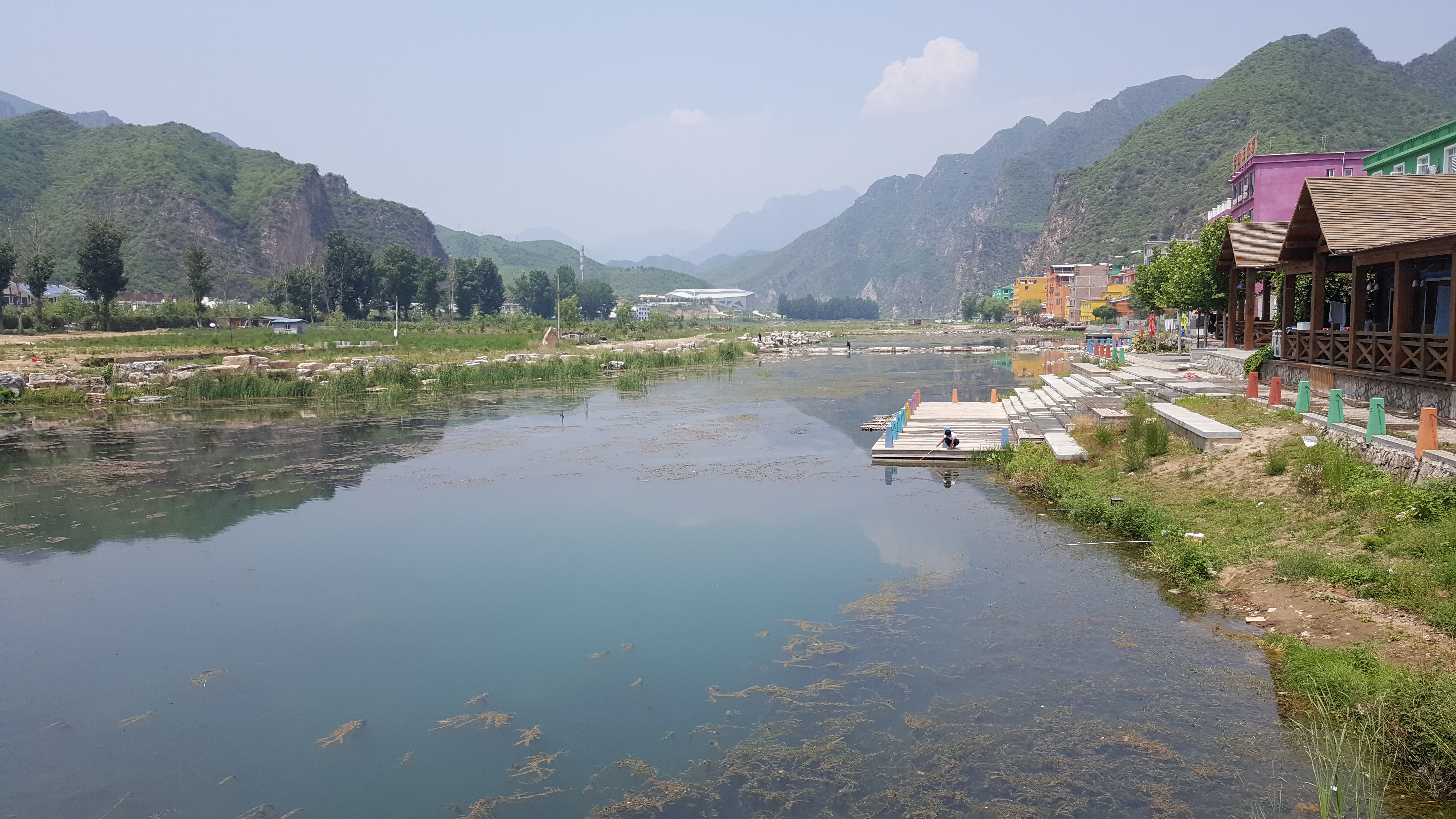 中文（中国大陆）: 拒马河苟各庄段